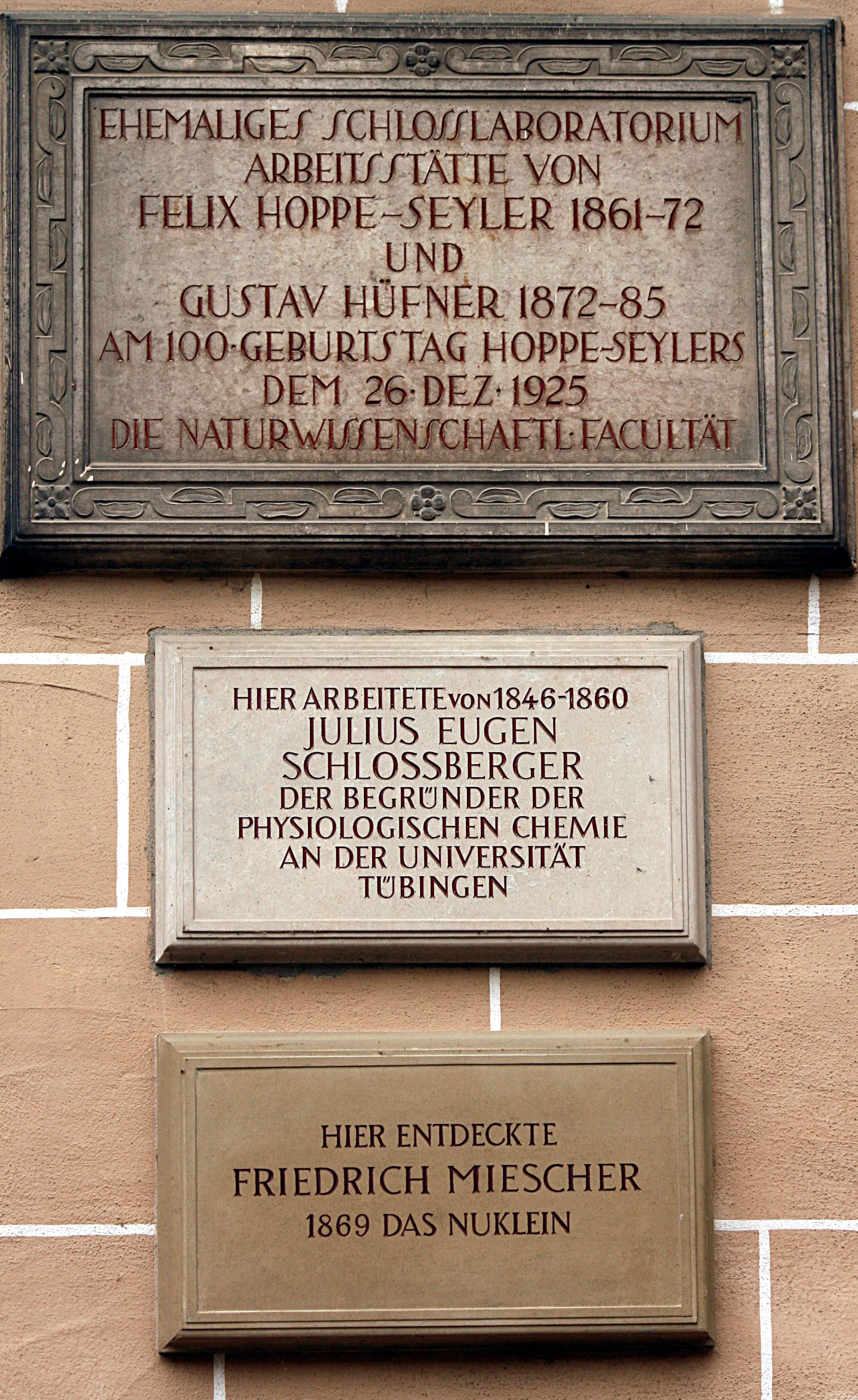 Tübingen, Schloss Hohentübingen, Innenhof, drei Tafeln